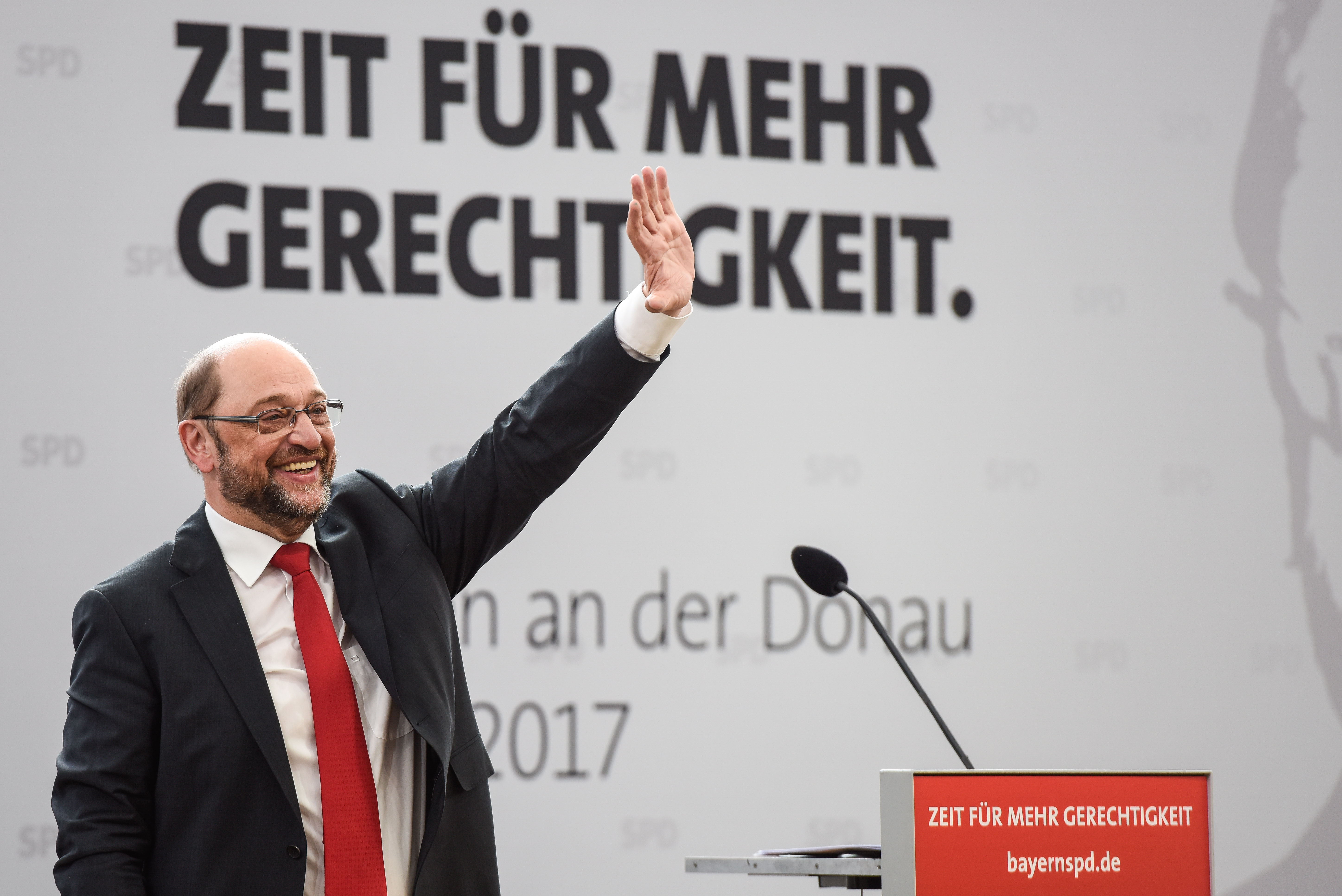 SPÖ-Vorsitzender, Bundeskanzler Christian Kern war neben dem deutschen SPD-Kanzlerkandidaten Martin Schulz der Hauptredner der Kundgebung am 1. März in Vilshofen (Foto: SPÖ OÖ/Alexander Schwarzl).